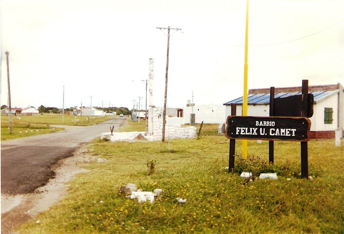 Entrada al barrio